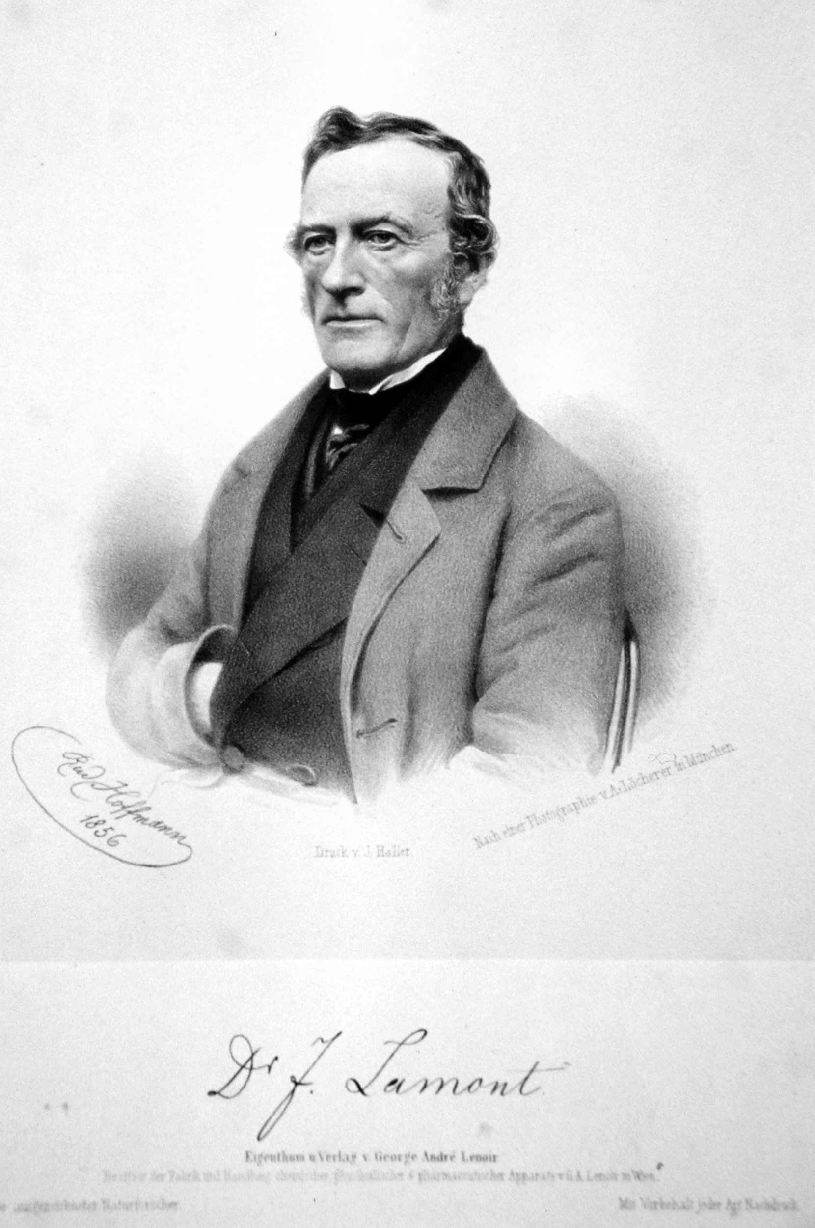 Johann Lamont (deutsch-schottischer Astronom), Lithographie von Rudolf Hoffmann, 1856. Nach einer Fotografie von Löcherer in München.